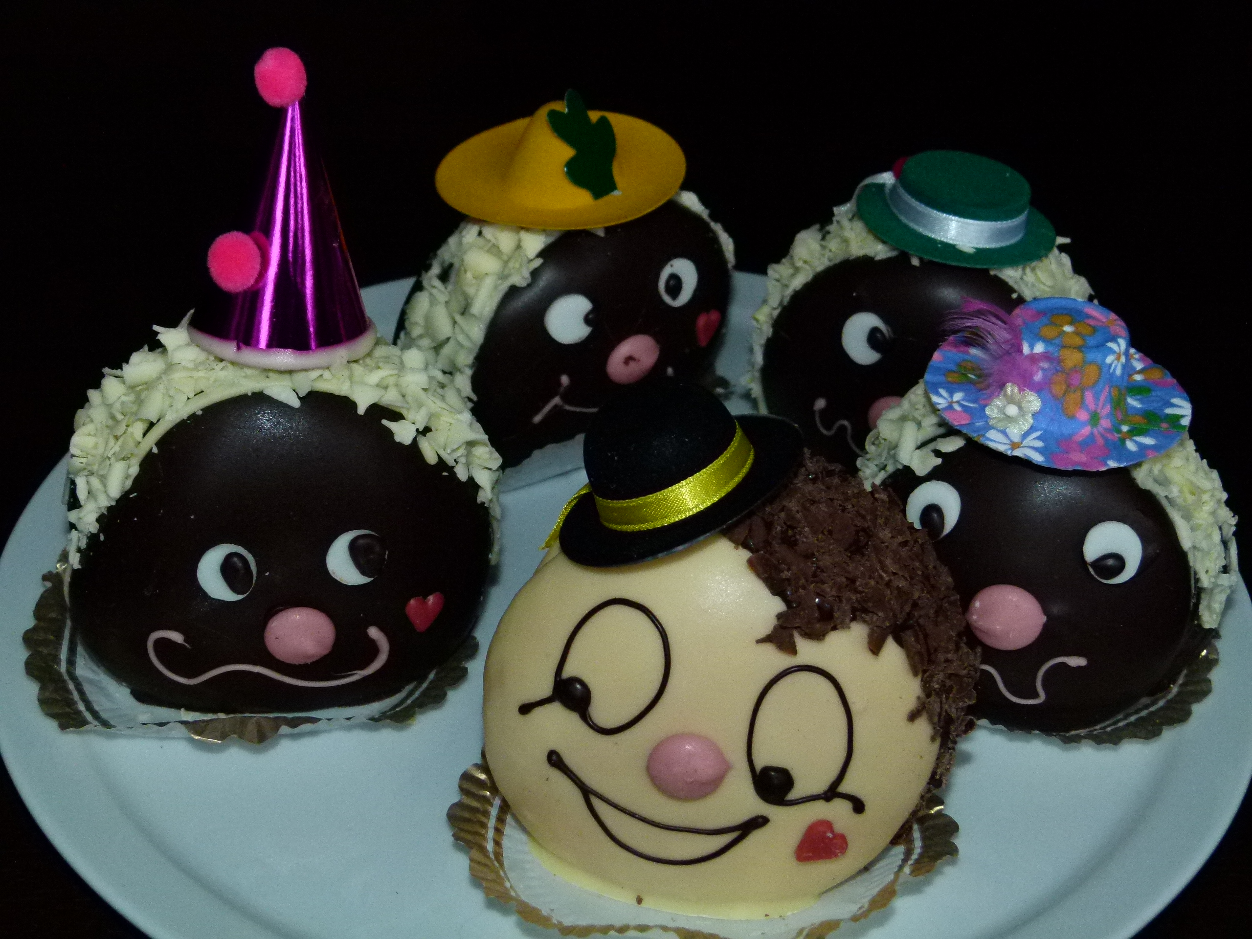 Faschings-Mohrenköpfe, Konditorei Eisold bei Karstadt Dresden